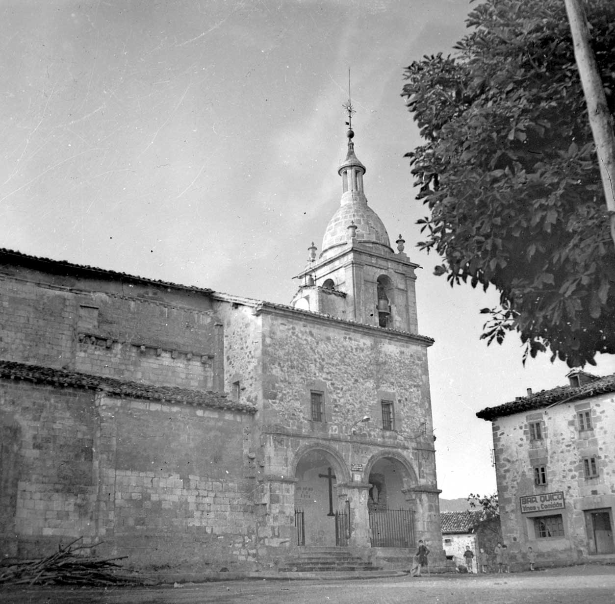 Urizaharrako (Araba) Jasokundearen eliza 1958an.